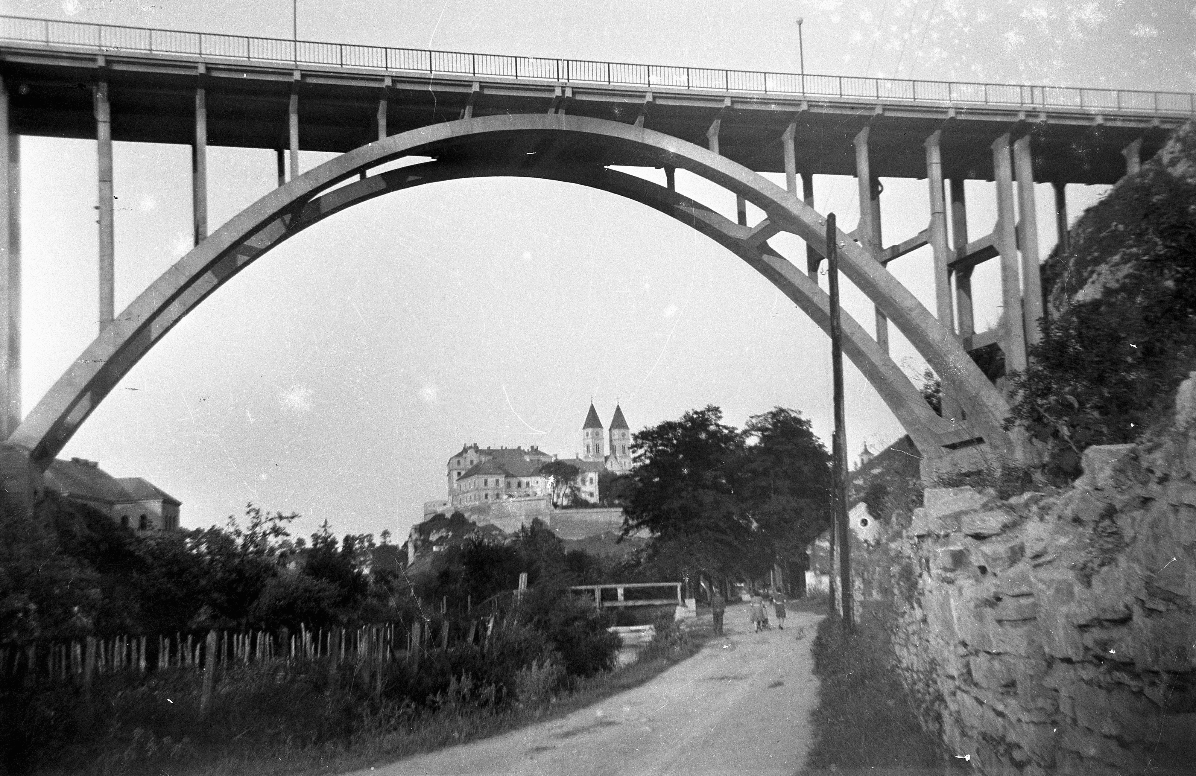 Szent István völgyhíd, háttérben a Vár. Location: Hungary Title: Szent István völgyhíd, háttérben a Vár.